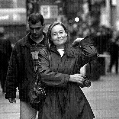 Sandra Balsells